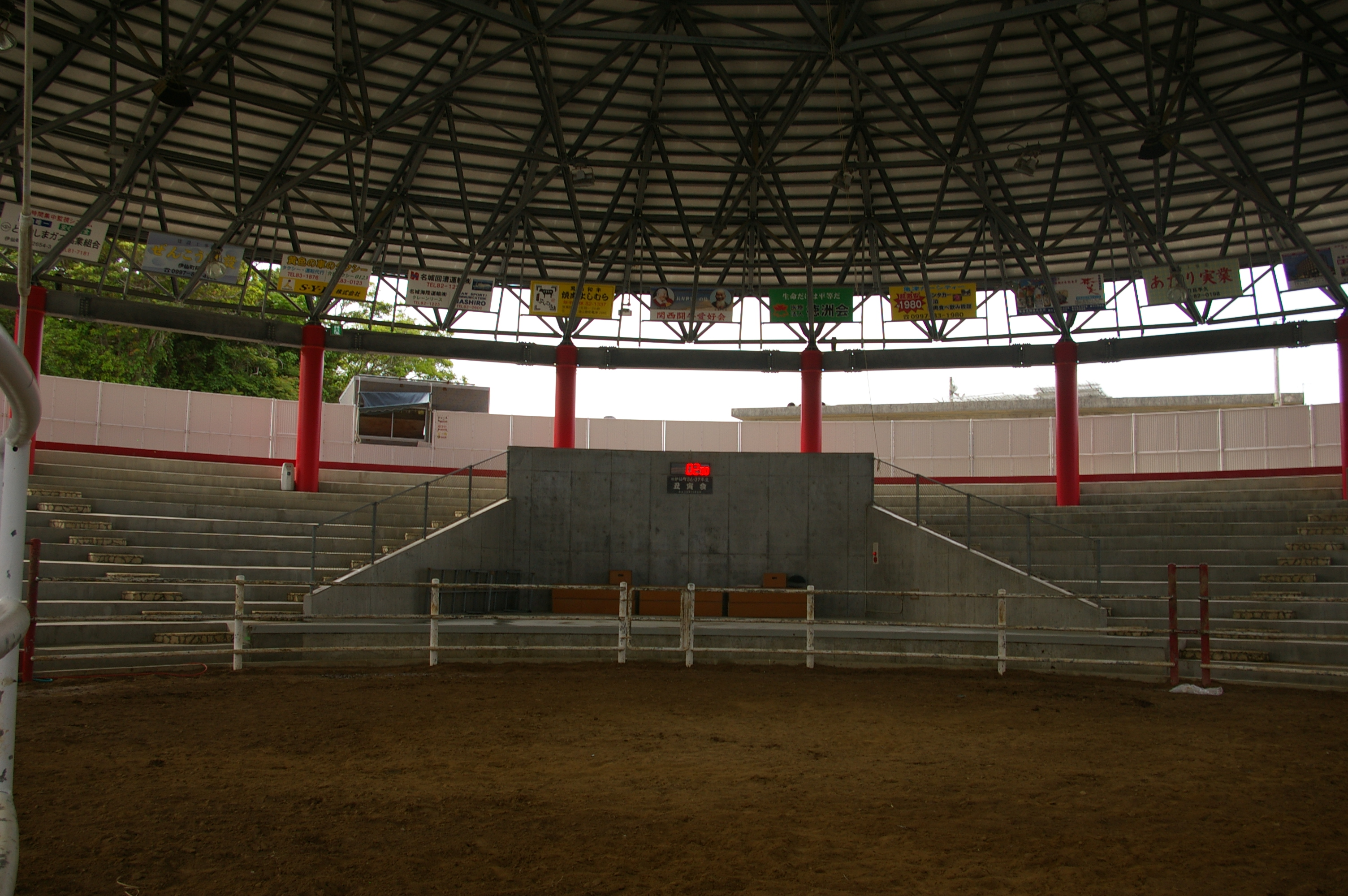 徳之島なくさみ館(伊仙町の闘牛場）